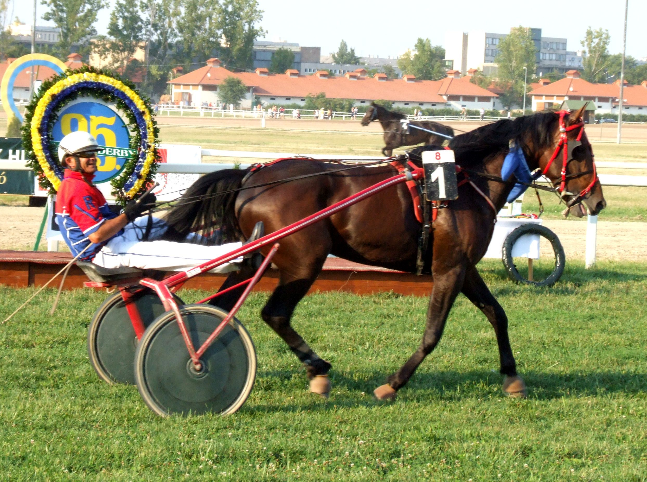 Ügető Magyar Derby 2009, Merengő, a győztes (Kincsem park, Budapest)